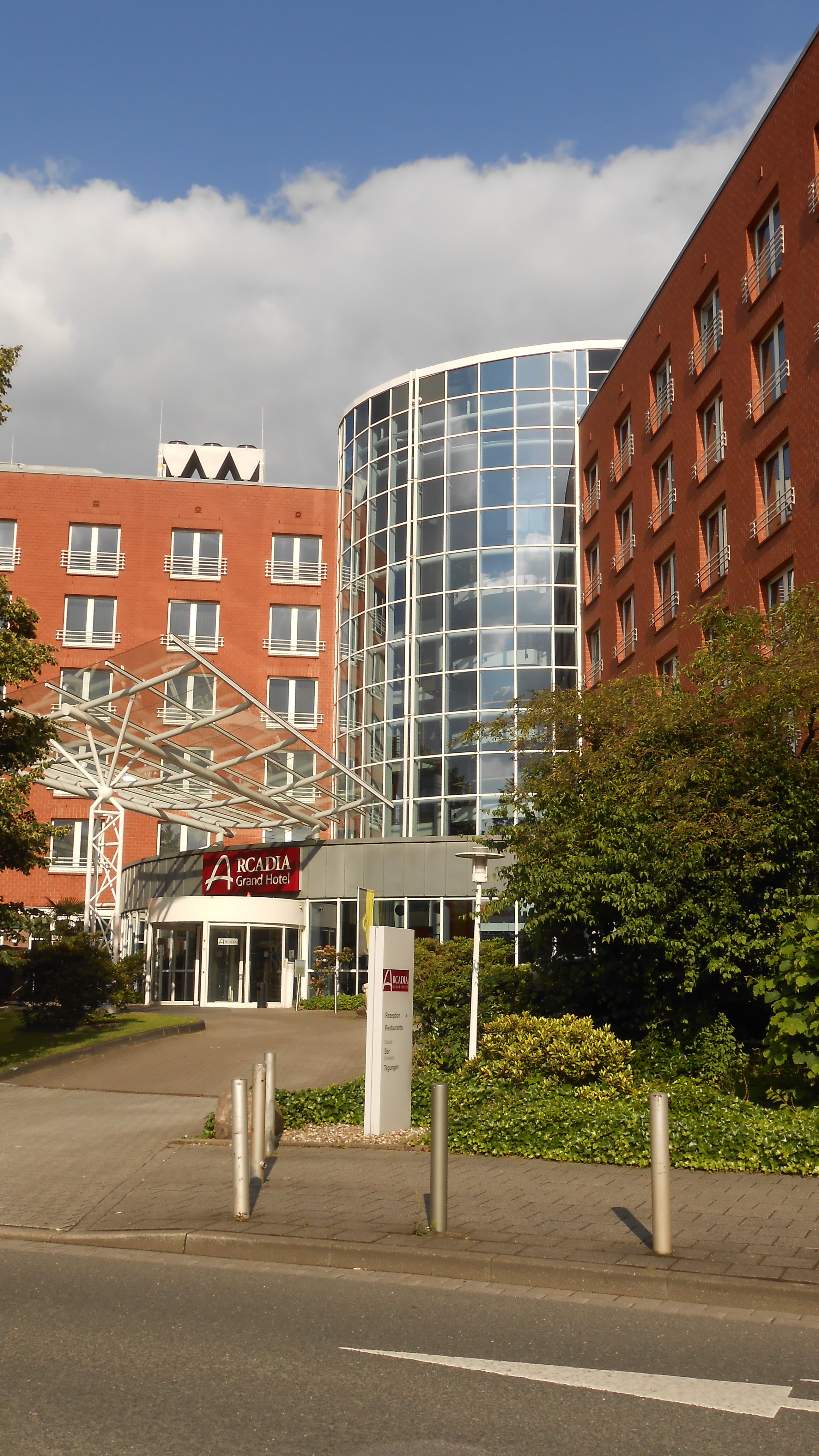 Der Eingang zum Arcadia Hotel in Dortmund (ehemals Pullman), nahe B1.